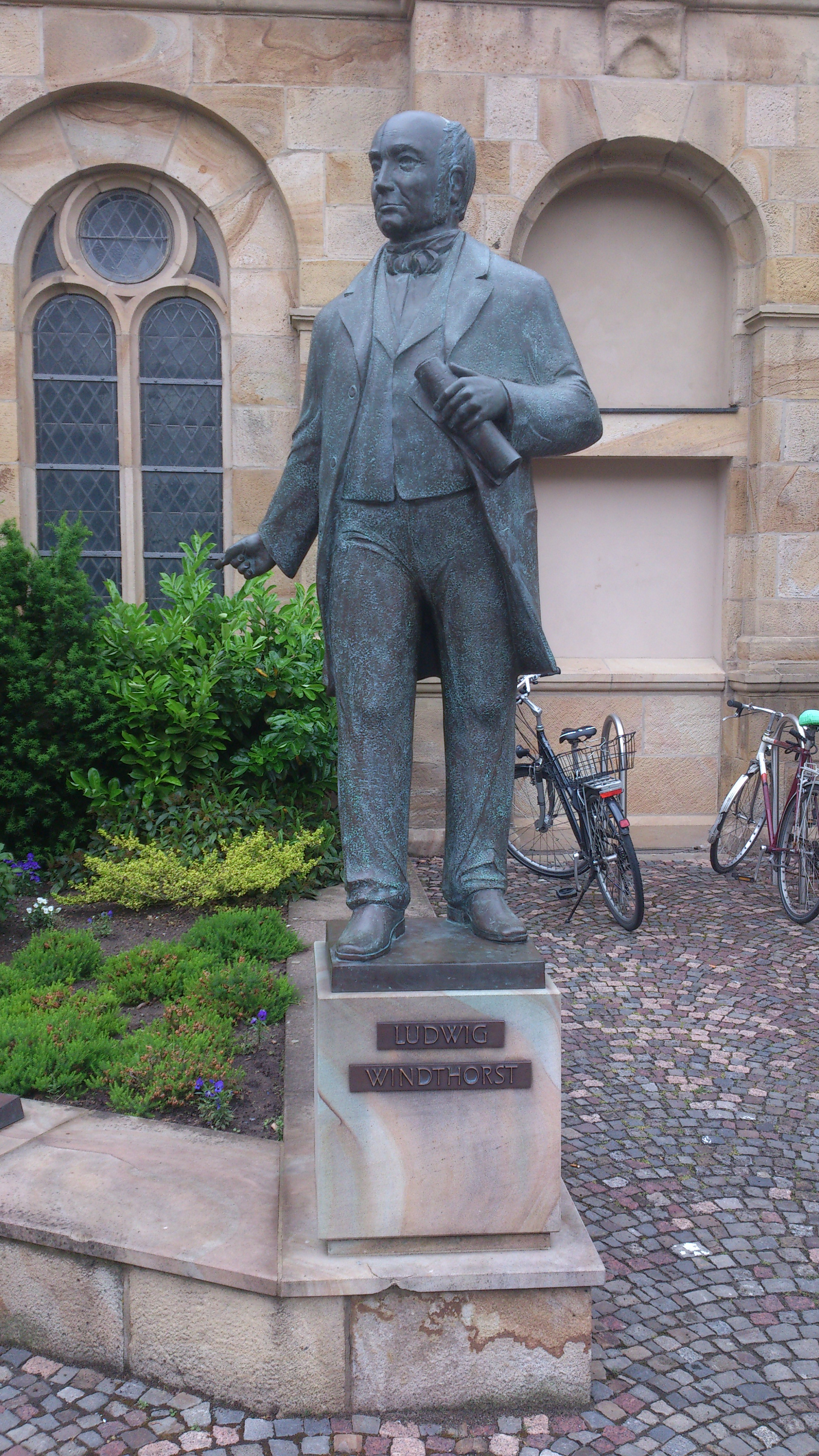 Windthorst-Denkmal, Osnabrück, geschaffen 2008